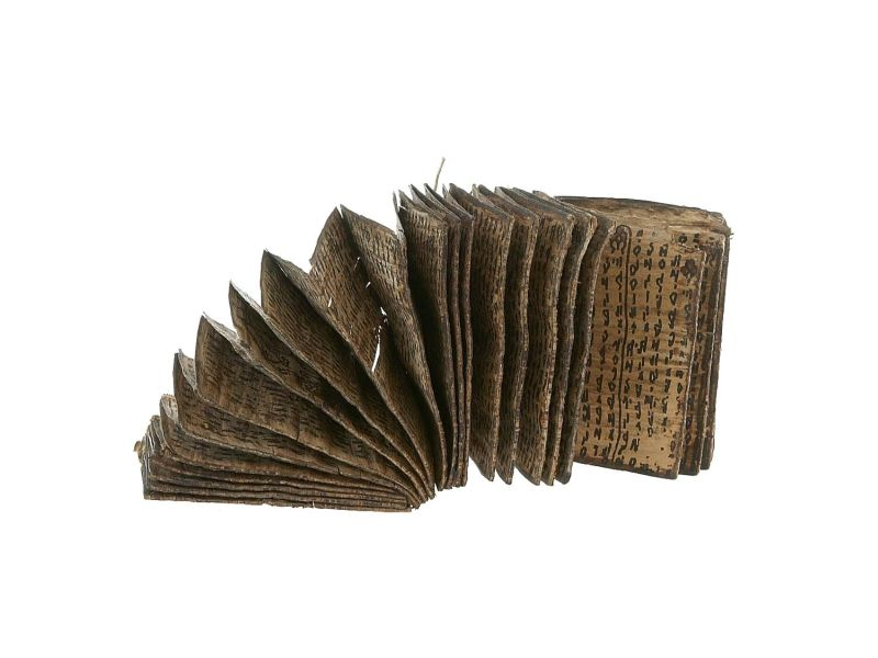 Wichelboek. Pustaha, wichelboek, met bladen van boomschors en enkele tekeningen van kutika's, kalenders waarmee goede en slechte dagen kunnen worden berekend. Er omheen staat Bataks schrift. . Wichelboek met magische kalenders voor het berekenen van goede en slechte dagen Unknown language: Pustaha